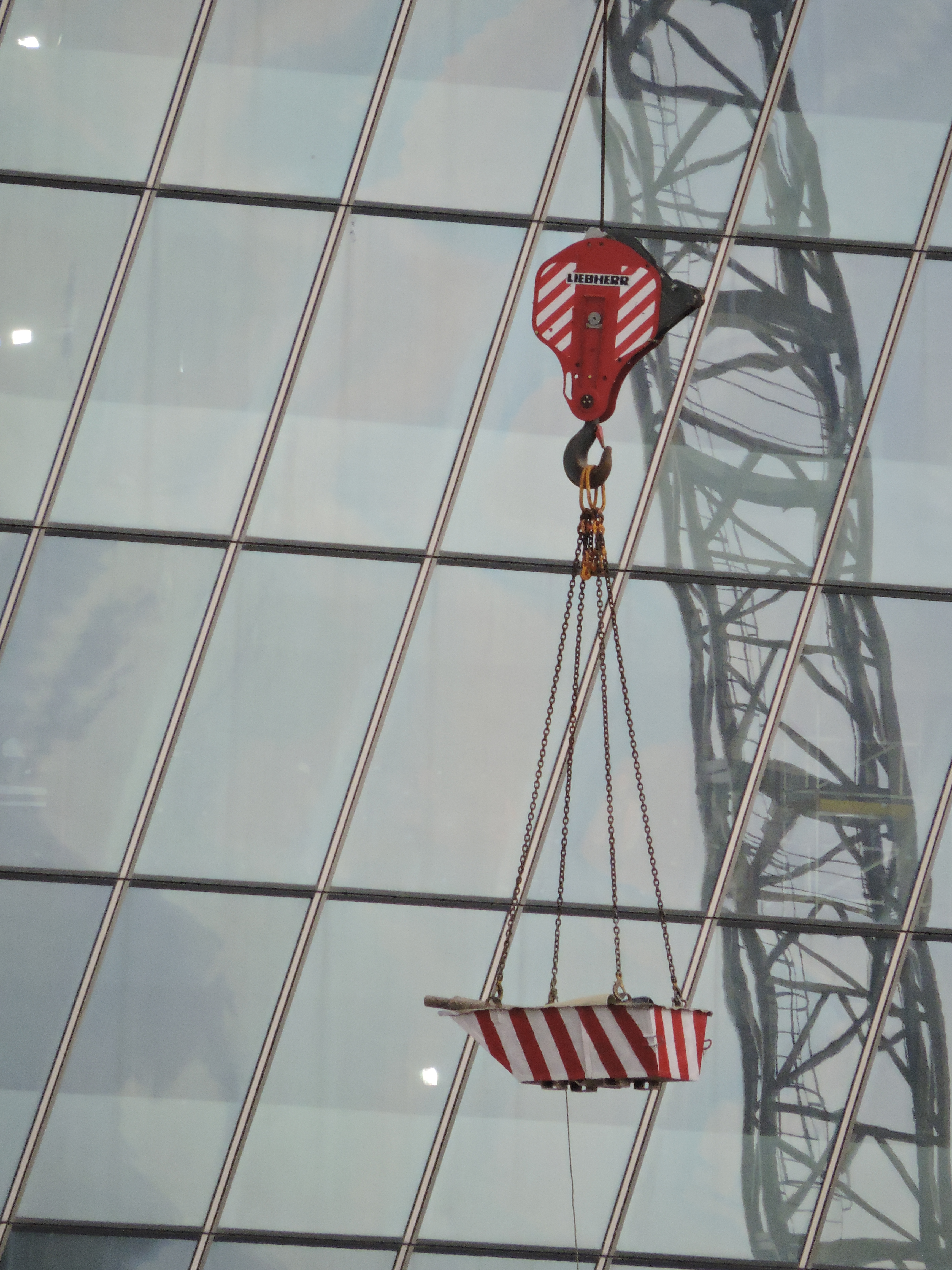 Крюковая подвеска с одним канатом